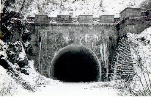 Das Nordportal des Silscheder Tunnels an der Bahnstrecke Witten–Schwelm